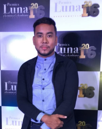 Sergio Borrero en los Premios Luna 2016